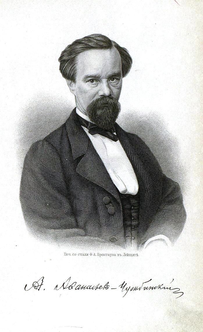 Александр Степанович Афанасьев-Чужбинский. Данное изображение было также использовано в статье «Афанасьев (Чужбинский), Александр Степанович» опубликованной в третьем томе «Военной энциклопедии», который был издан книгоиздательским товариществом Ивана Дмитриевича Сытина в 1911 году в столице Российской империи городе Санкт-Петербурге.